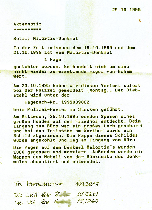 (Abschrift): "25. 10. 1995 Aktennotiz Betr.: Malortie-Denkmal In der Zeit zwischen dem 19.10.1995 und dem 21.10.1995 ist vom Malortie-Denkmal 1 Page gestohlen worden. Es handelt sich um eine nicht wieder zu ersetzende Figur von hohem Wert. Am 23.10.1995 haben wir diesen Verlust sofort bei der Polizei gemeldet (Montag). Der Diebstahl wird unter der Tagebuch-Nr. 1995009802 beim Polizei-Revier in Stöcken geführt. Am Mittwoch, 25.10.1995 wurden Spuren eines großen Hundes auf dem Friedhof entdeckt. Beim Eingang zum Büro war ein großes Loch gescharrt und bei den Toiletten am Werkhof wurde ein Schild abgerissen. Die Pappe dieses Schildes wurde angekohlt und lag am Eingang vom Büro. Die Pagen auf dem Denkmal Malortie's wurden 1886 gegossen und montiert. Außerdem wurde ein Wappen aus Metall von der Rückseite des Denkmales abmontiert und entwendet. Tel. ..." Hinweis: Die Namen der LKA-Beamten wurden zwecks Wahrung möglicher Persönlichkeitsrechte elektronisch unleserlich gemacht. Anmerkung: Kopie der Aktennotiz dank dem Leiter des Herrenhäuser Friedhofs, Herrn Sergej Stoll. Dieser ist auch im Besitz von zwei Farbfotografien, auf denen die beiden (unterschiedlichen) Pagen-Figuren deutlich zu sehen sind. Bis zur Klärung der Urheberschaft der Fotografien können diese für Wikimedia Commons noch nicht zur Verfügung gestellt werden. Ein weiteres Foto ist im Eigentum des Niedersächsischen Landesamtes für Denkmalpflege : Eine verkleinerte Kopie davon findet sich im dem Buch Denkmaltopographie Bundesrepublik Deutschland, Baudenkmale in Niedersachsen, Stadt Hannover, Teil 1, Bd. 10.1, S. 200.